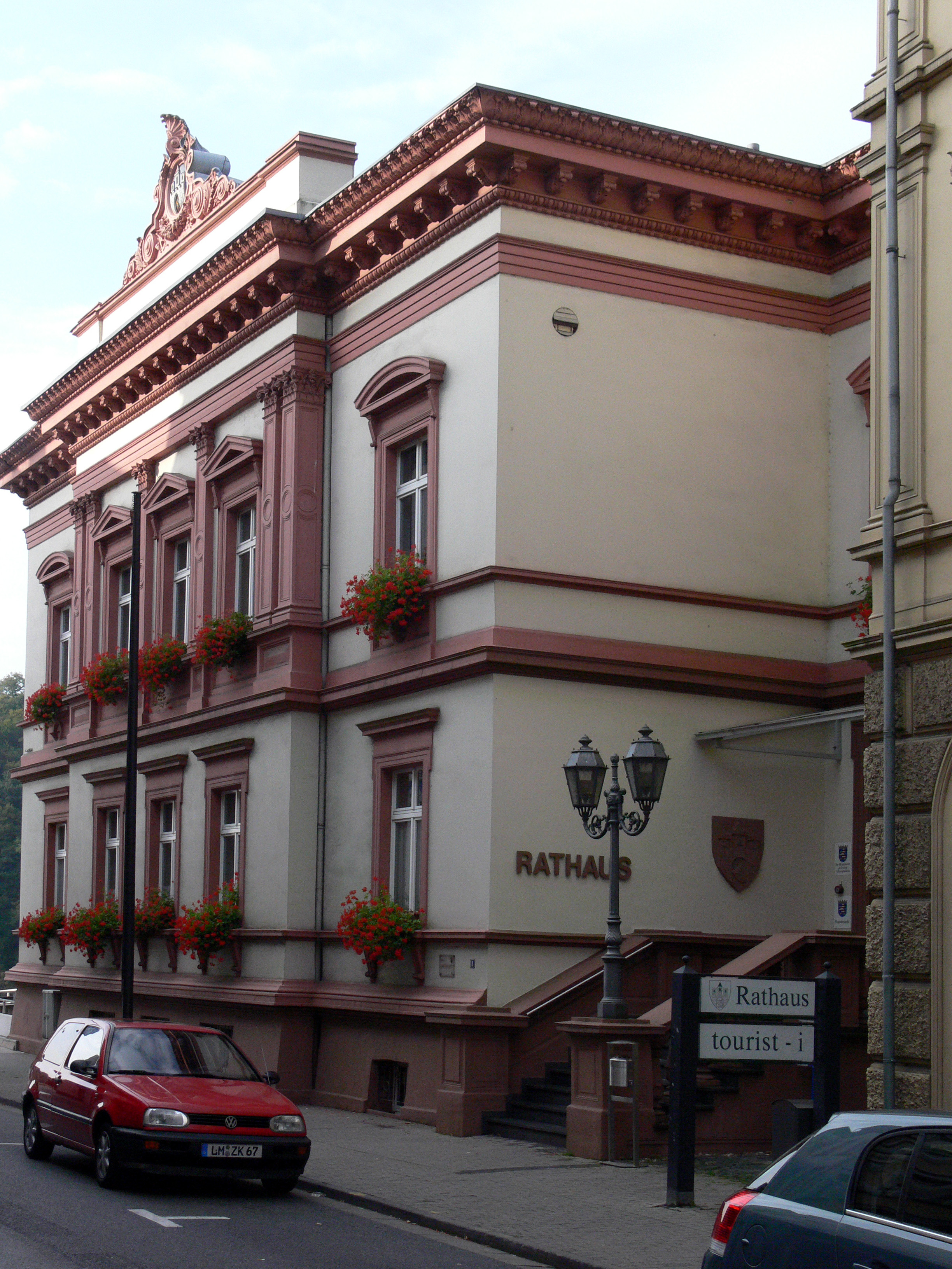 Weilburg,Lahn, Deutschland, Rathaus. Das Gebäude in der Mauerstraße 8 wurde 1877-1878 als Kommandeurswohnung für die 1. preußische Unteroffiziersvorschule erbaut. Es besitzt ein elegantes klassizistisches Äußeres und wird heute als Weilburger Rathaus genutzt. Im Erdgeschoss des zum Rathaus gehörenden Nachbarhauses befindet sich außerdem die Touristen-Information.